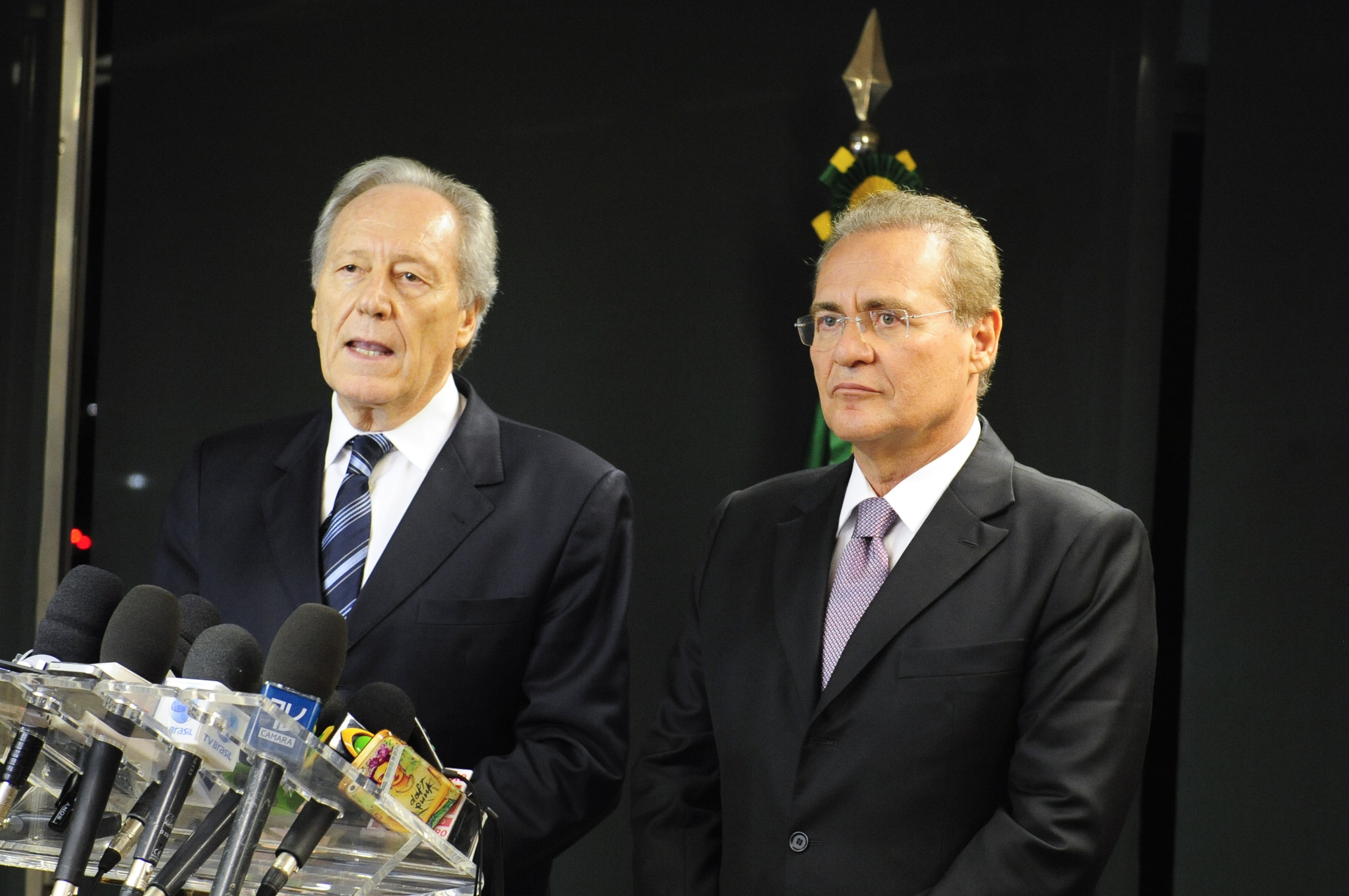 Os presidentes do Senado Federal, senador Renan Calheiros (PMDB-AL), e do Supremo Tribunal Federal (STF), Ricardo Lewandowski, concedem entrevista coletiva à impresa. Eles afirmam que vão definir juntos o rito que deverá ser seguido durante a análise do processo de impeachment da presidente Dilma Rousseff no Senado. Foto: Jonas Pereira/Agência Senado